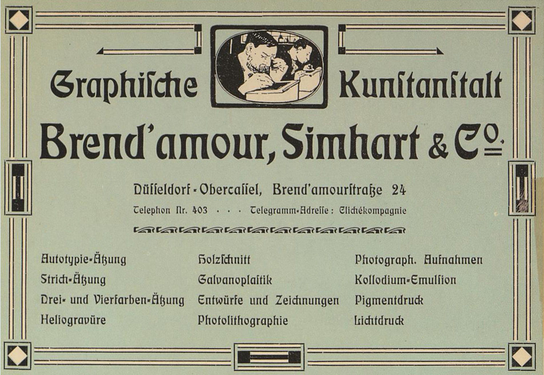 Graphische Kunstanstalt Brend'amour, Simhart & Co., Brend'amourstraße 24, Düsseldorf, 1905